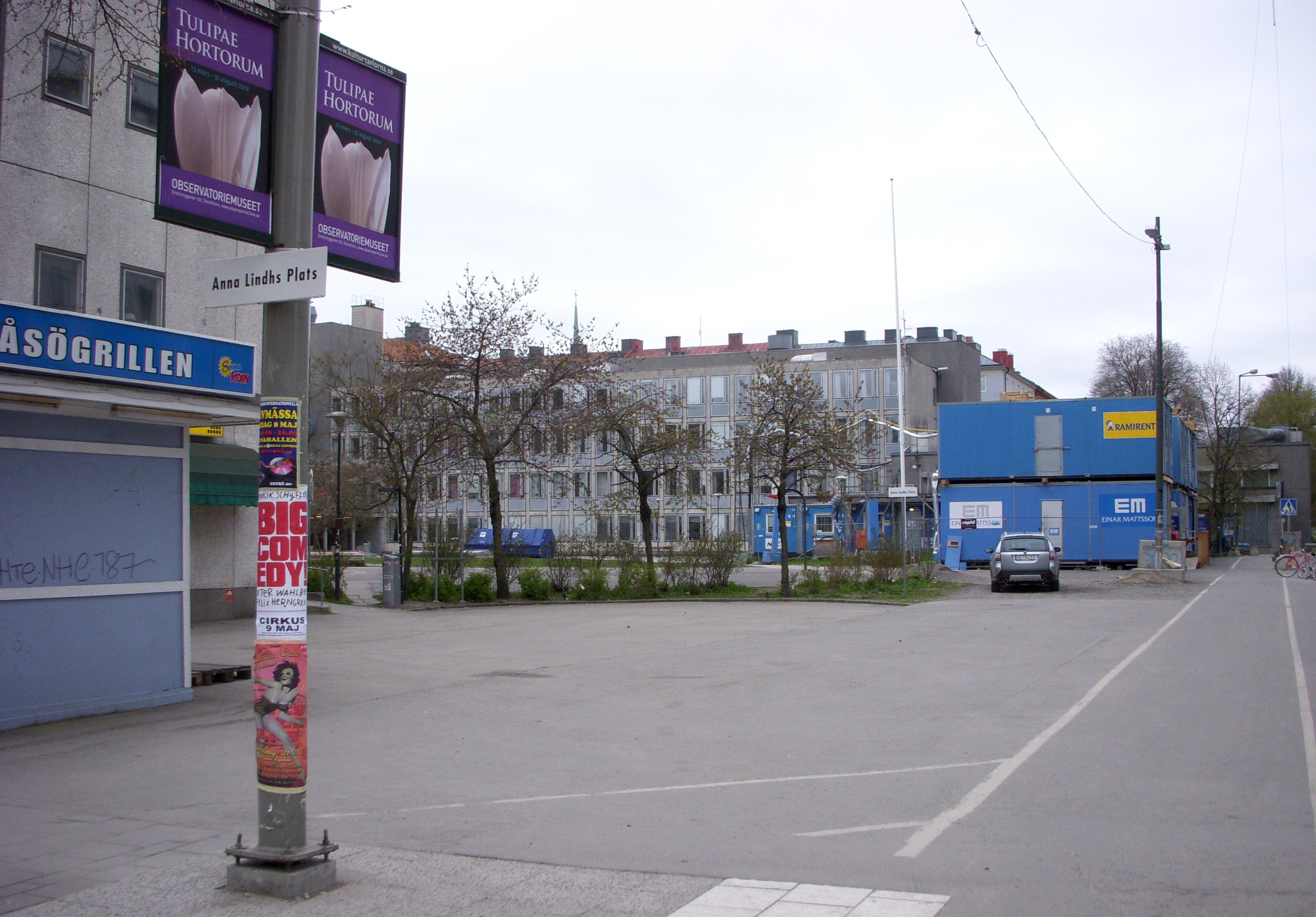 Anna Lindhs plats på Söadermalm i Stockholm